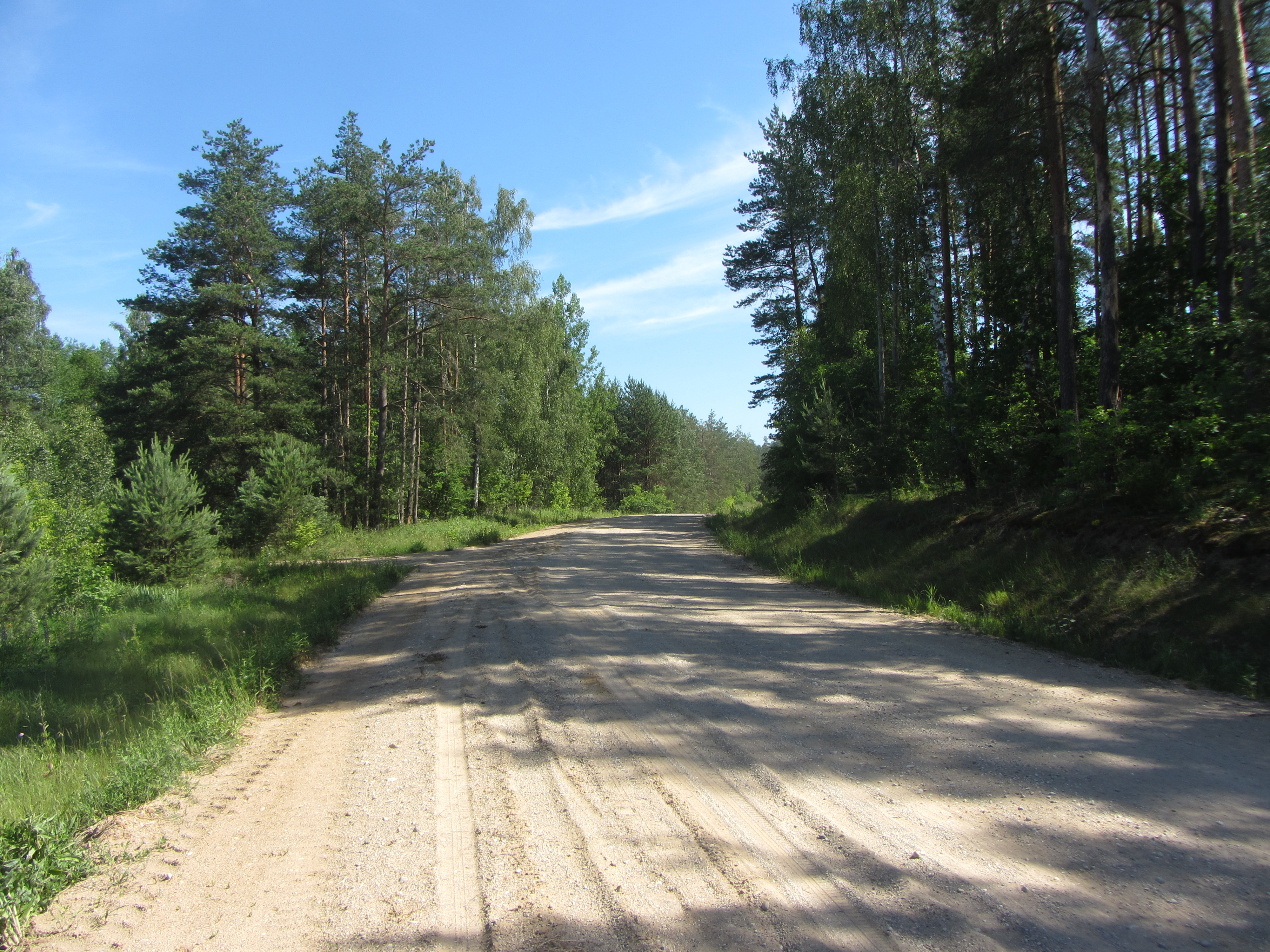 Varėnos sen., Lithuania